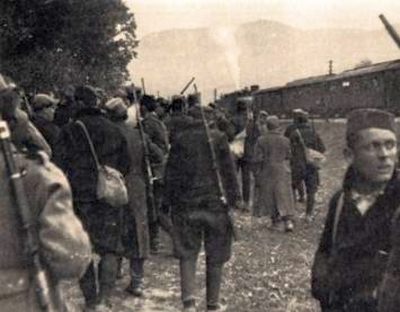 Srpskohrvatski / српскохрватски: Nakon prijema oružja iz užičke fabrike naoružanja Takovski partizanski bataljon ukrcava se u partizanski voz i odlazi na položaj. Užice, oktobra 1941.